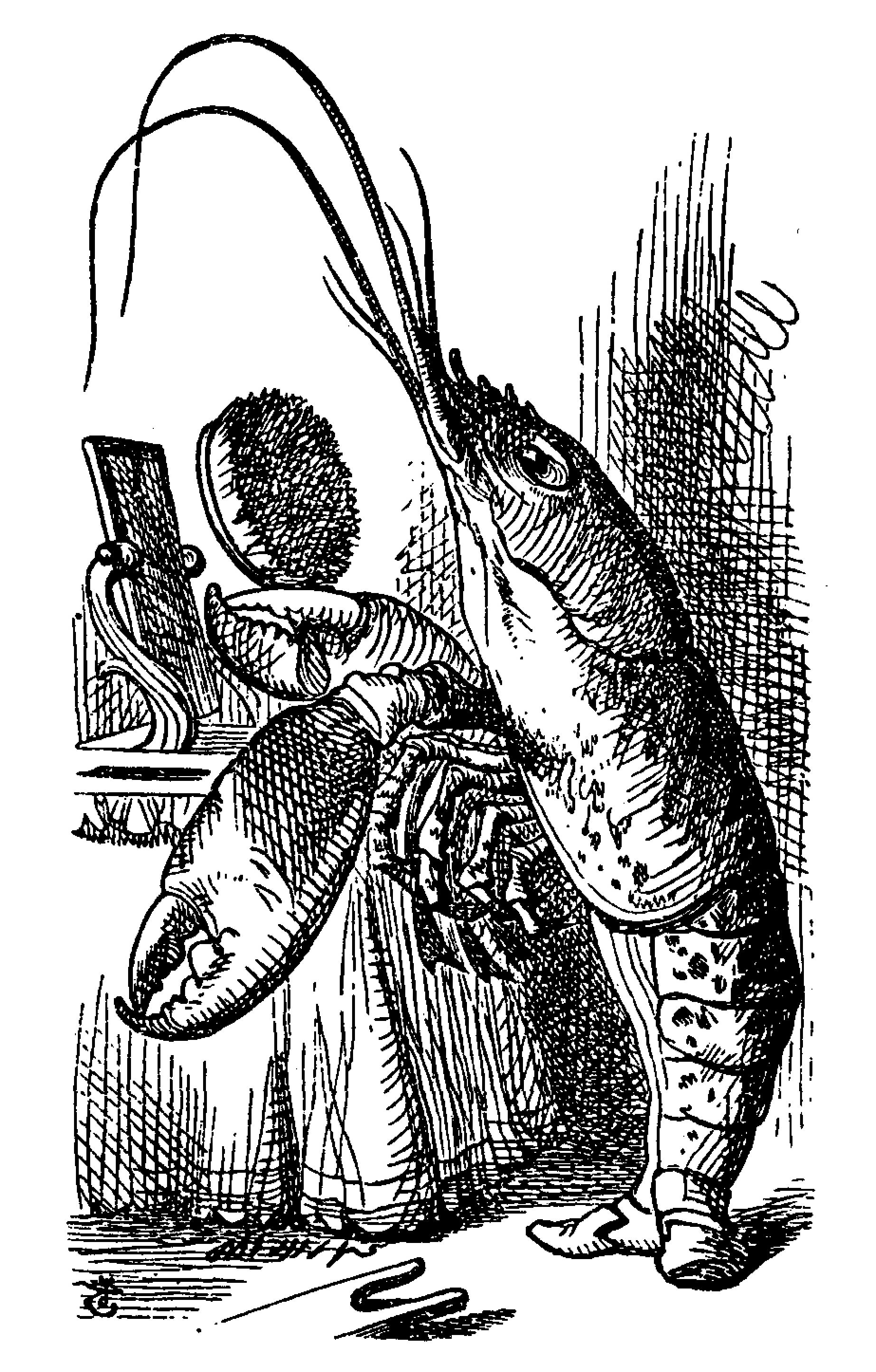 Alice’s Abenteuer im Wunderland Übersetzer: Antonie Zimmermann Orginal Titel: Alice's Adventures in Wonderland Illustrationen: John Tenniel